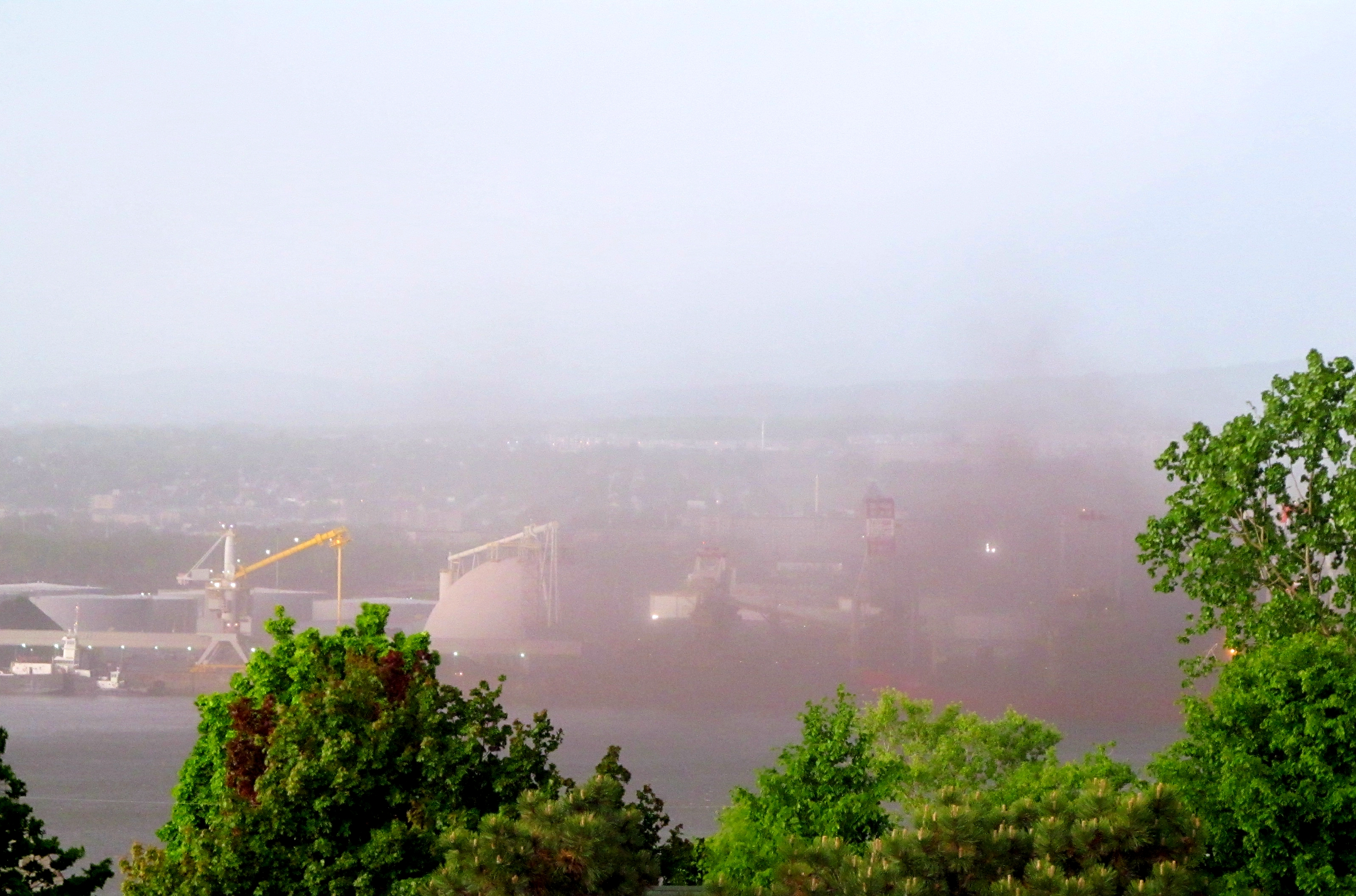 Nuage de poussière émanant des activités de manutention de vrac solide au port de Québec.